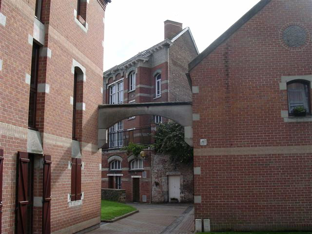 Îlot rue de la Croix, Maubeuge